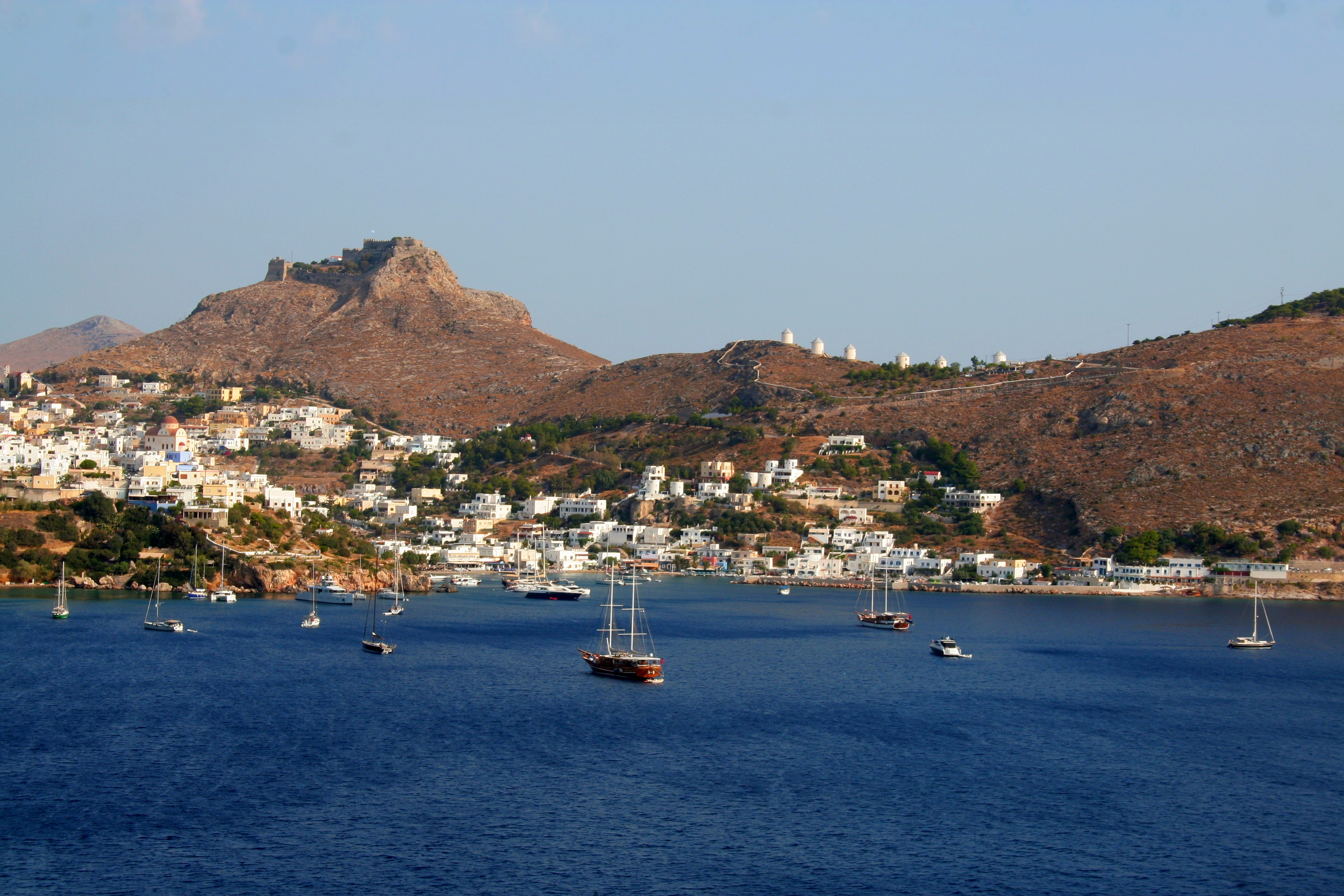 Κάστρο Παντελίου. Φωτογραφία από την παραλία Βελανίδα (Βελανιδιά). Διακρίνονται εκτός από το Παντέλι (κάτω από τους ανεμόμυλους), ο Πλάτανος (κάτω από το Κάστρο), τα Σπήλια και μέρος του Βρομόλιθου.«Κάστρο Παντελίου»